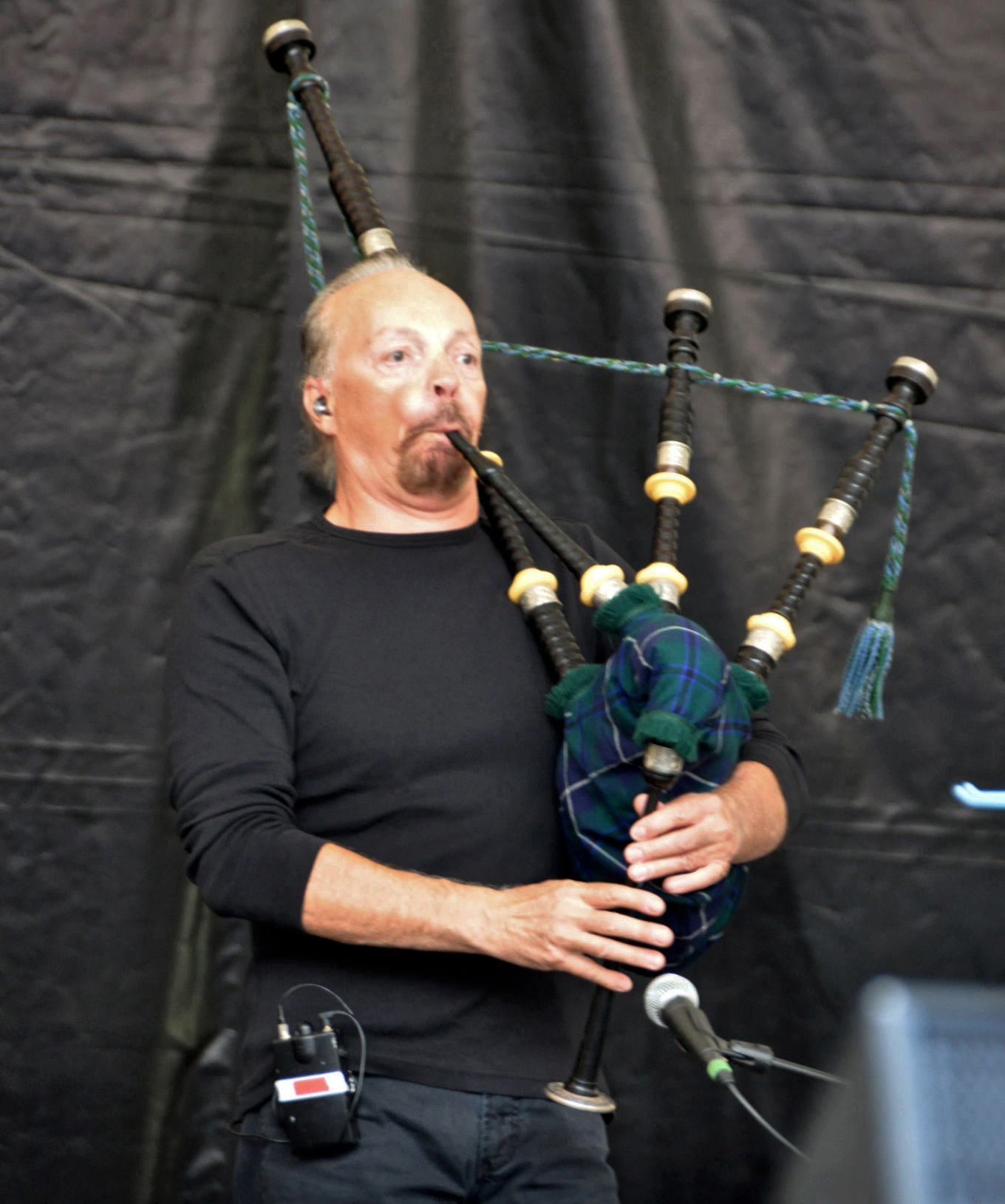 Alan Stivell en concert à Gourin lors du Championnat des sonneurs le 5 septembre 2010.